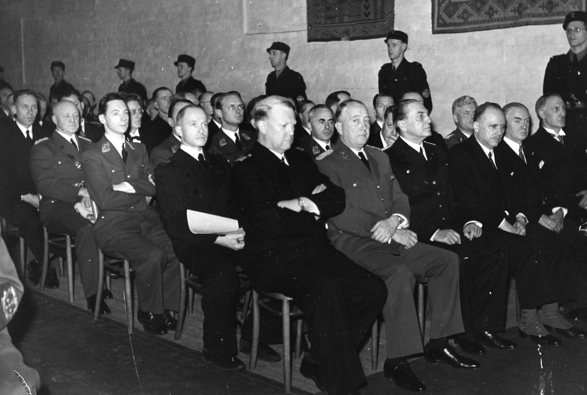 RA/RAFA-3309/U 39A/ /21 img175 «Statsakten» var en seremoni på Akershus slott i Oslo under andre verdenskrig 1. februar 1942 da rikskommissar Josef Terboven innsatte Vidkun Quisling, leder for Nasjonal Samling (NS), som «ministerpresident» i Norge, og de tyskkontrollerte kommissariske ministerne ble erstattet av «den nasjonale regjering» utgått fra NS. «Statsakten» markerte at Quisling fikk den formelle makta i Norge, og ved lov av 12. mars 1942 ble NS «statsbærende parti». Quisling hadde håp om at ordninga også skulle gi NS reell makt og føre til fred mellom Norge og Tyskland, men tysk tilsynsforvaltninga gjennom Reichskommissariat Norwegen fortsatte som før inntil frigjøringa 8. mai 1945.